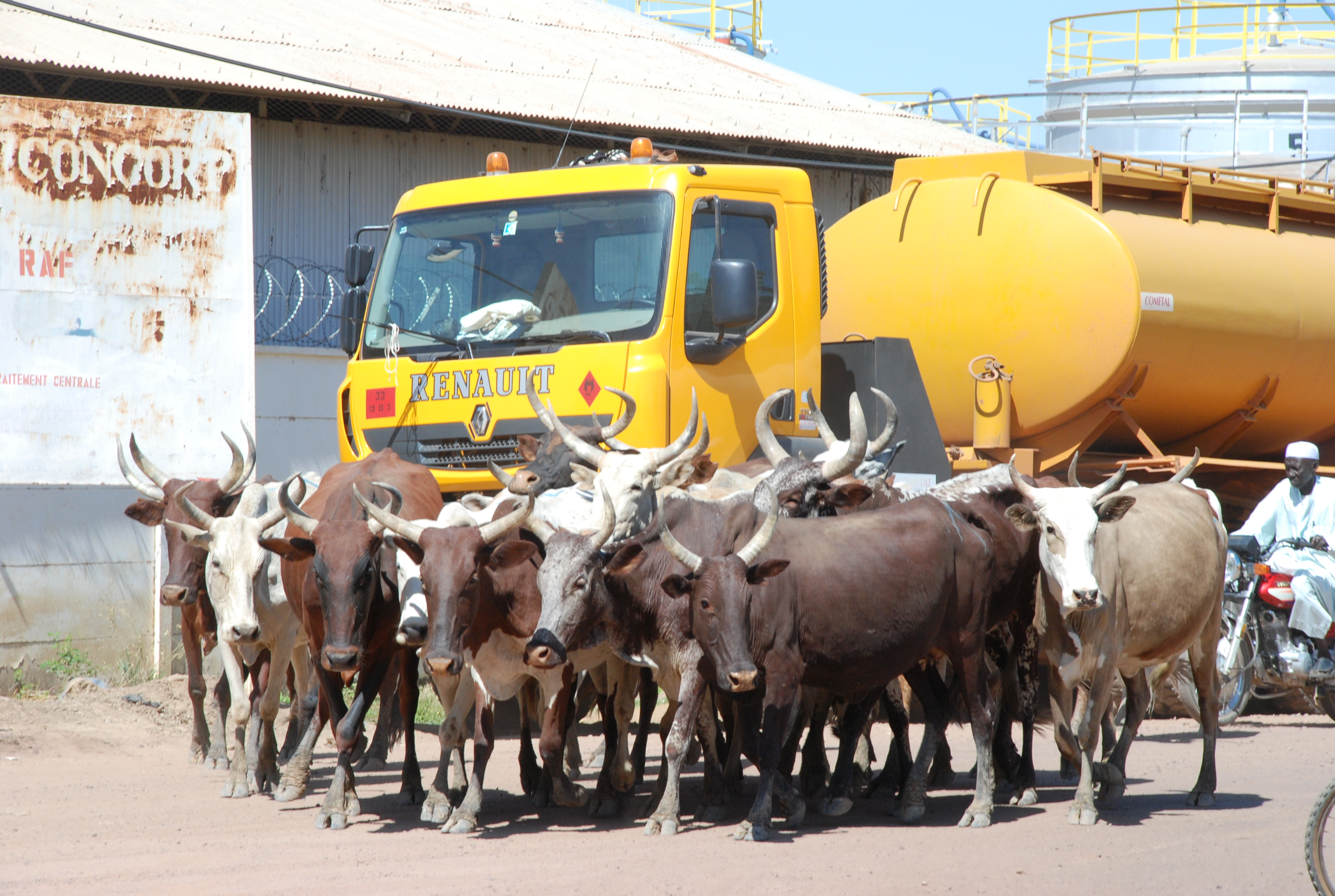 Transhumance des vaches du Tchad pour le Cameroun This is an image with the theme "Africa on the Move or Transport" from: Chad